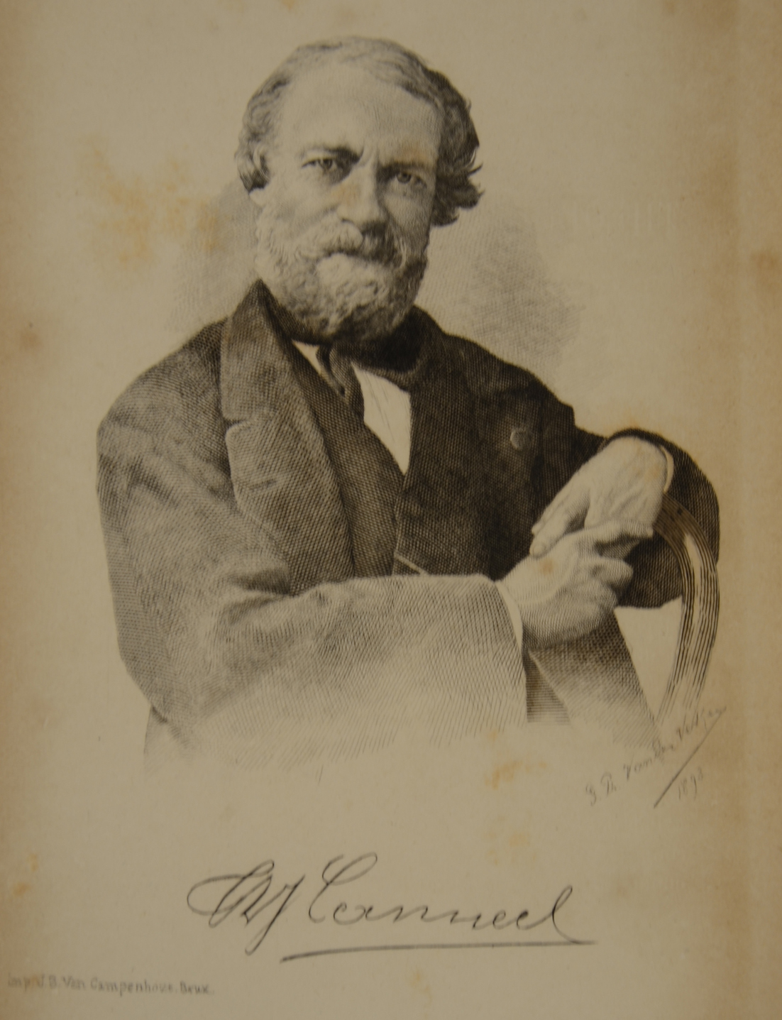 Portret van de kunstschilder Theodore Canneel